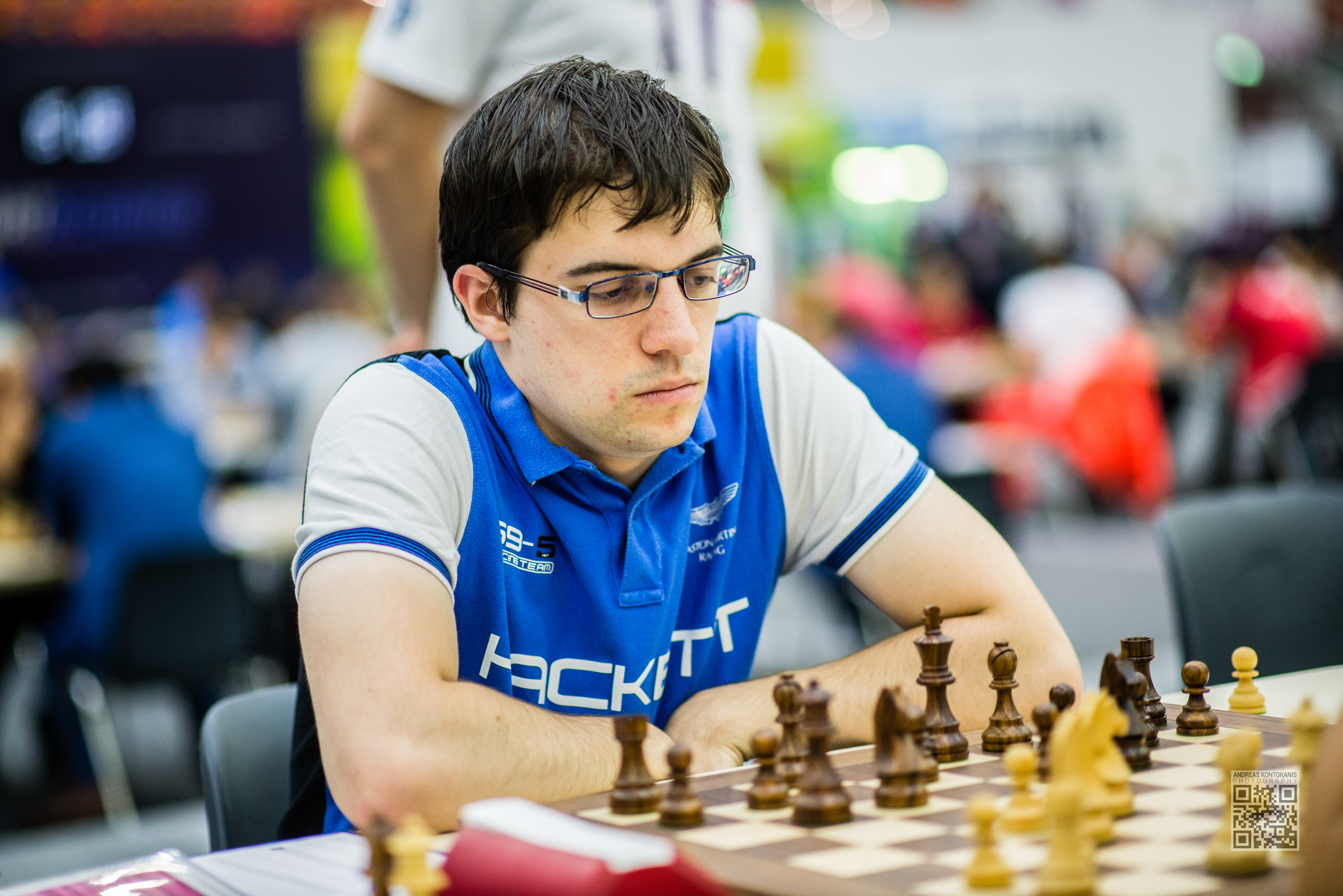 Vachier-Lagrave Maxime